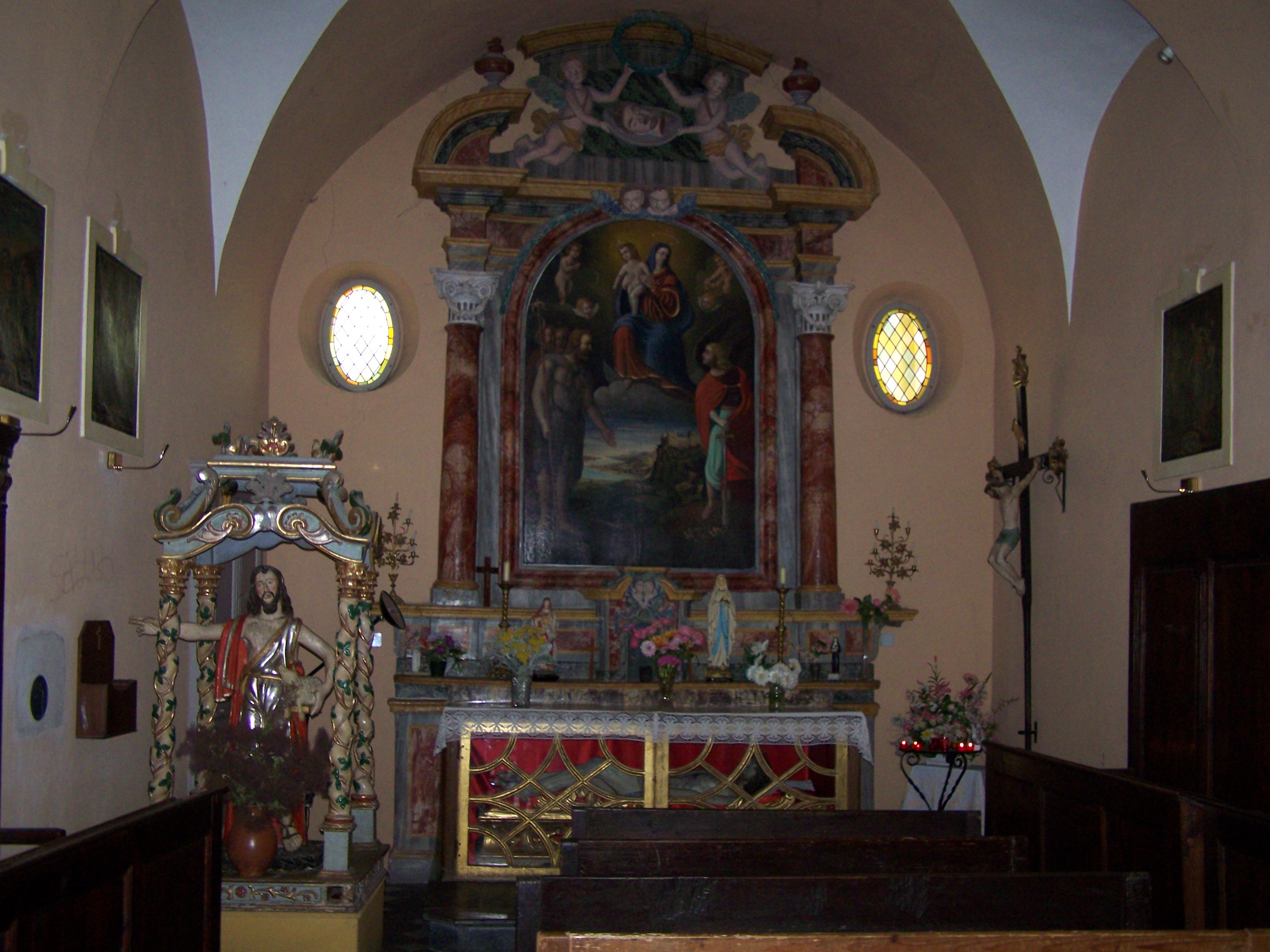 Intérieur de la chapelle de la confrérie des pénitents noirs (16° siècle) dans le village de Levens (Alpes-Maritimes, France)